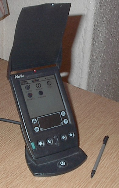 Palm IIIc personal digital assistant in its cradle.